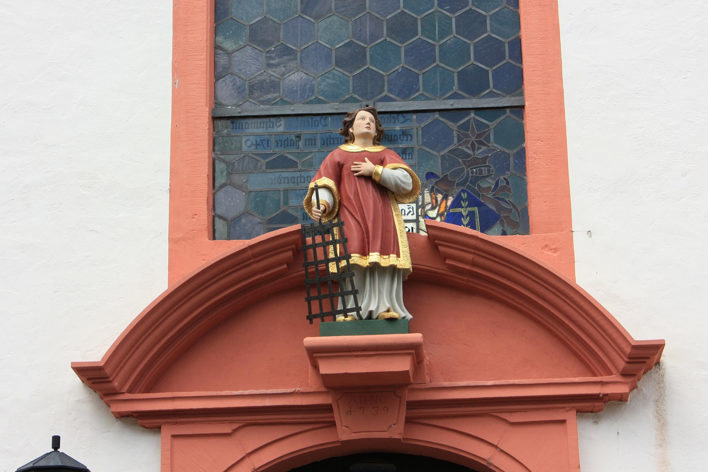 St. Vinzenz über dem Eingang der Kirche in Hattenheim, Rheingau, Hessen